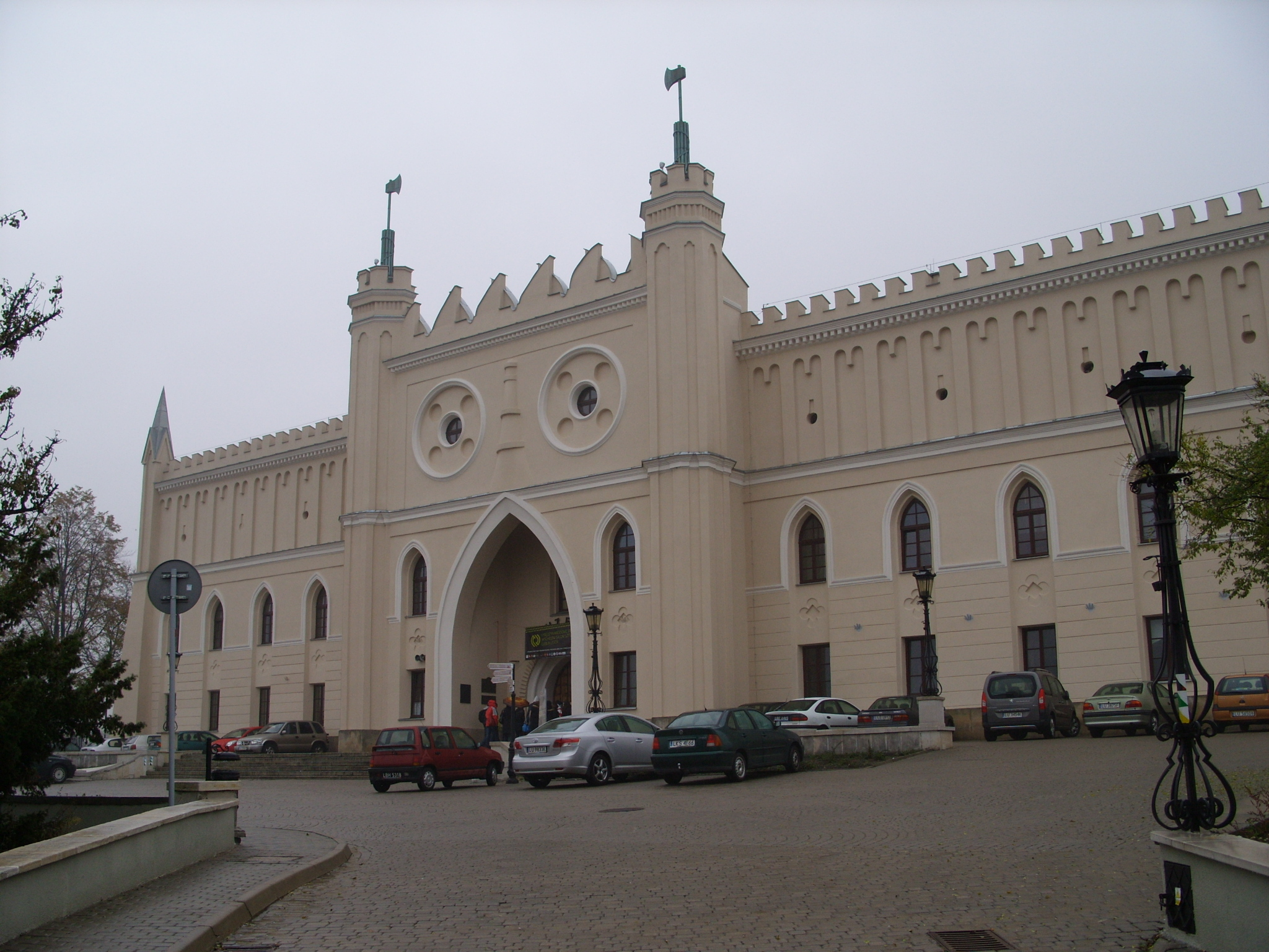 A lublini vár (Lengyelország)